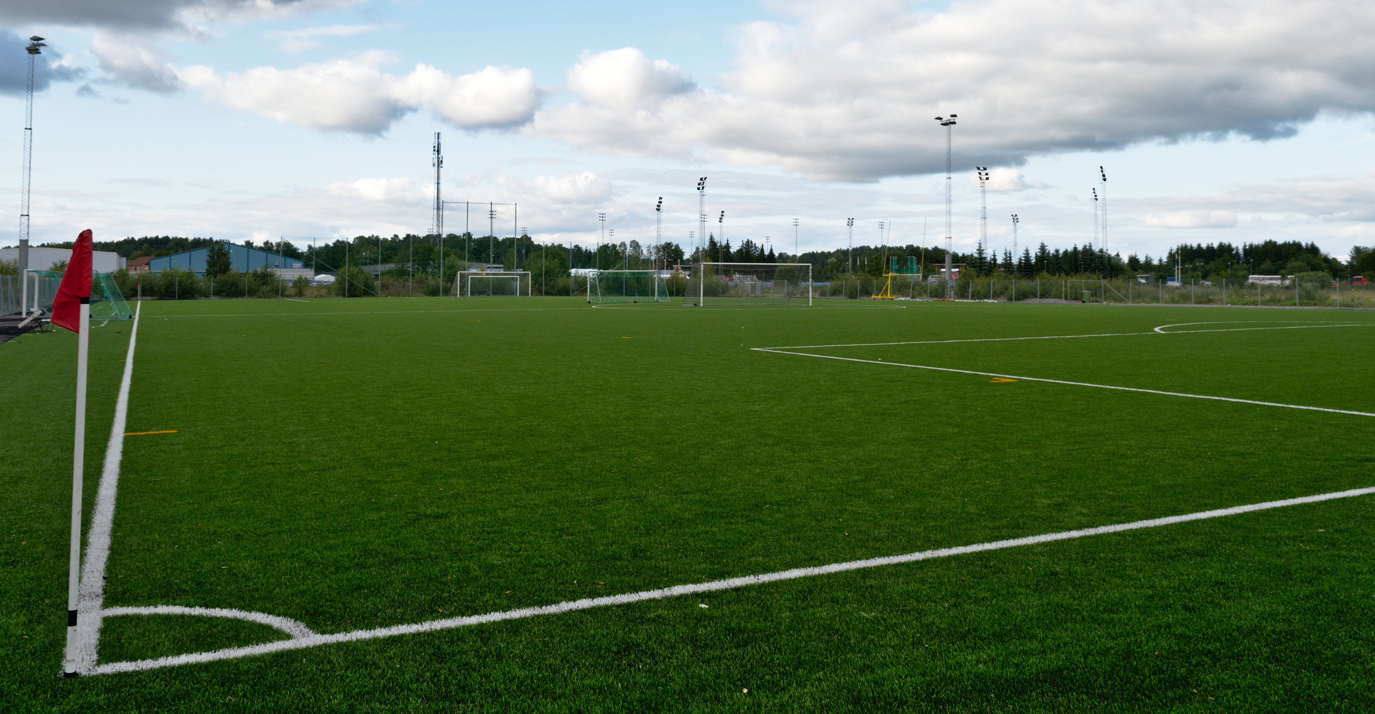 Konstgräsplanen vid Ekängen i Eskilstuna.